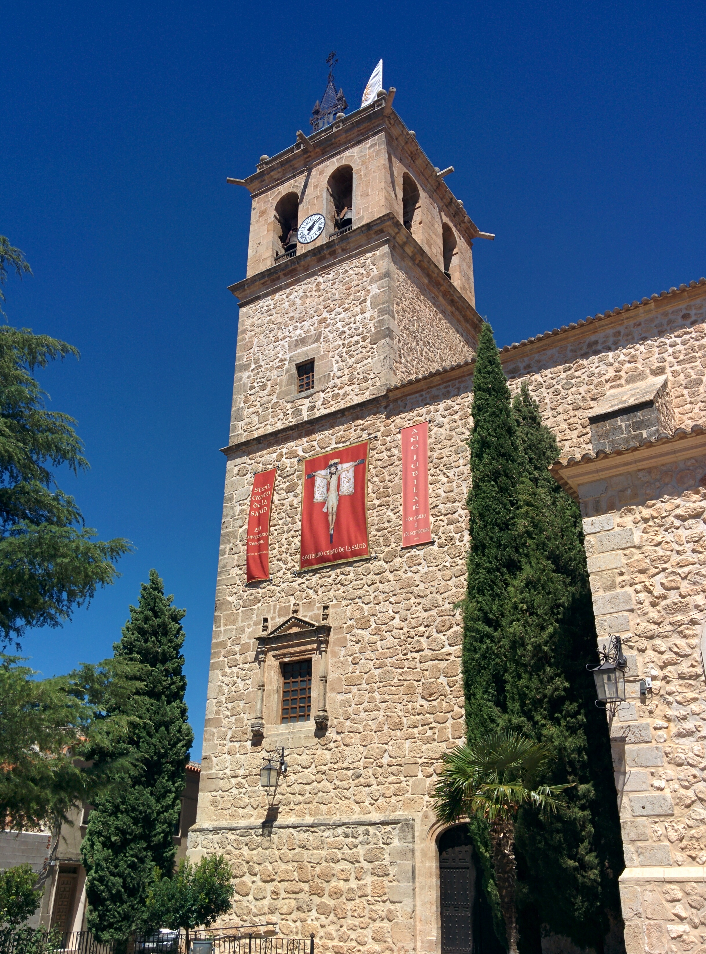 Iglesia de San Juan Bautista, en La Puebla de Almoradiel (Toledo, España).